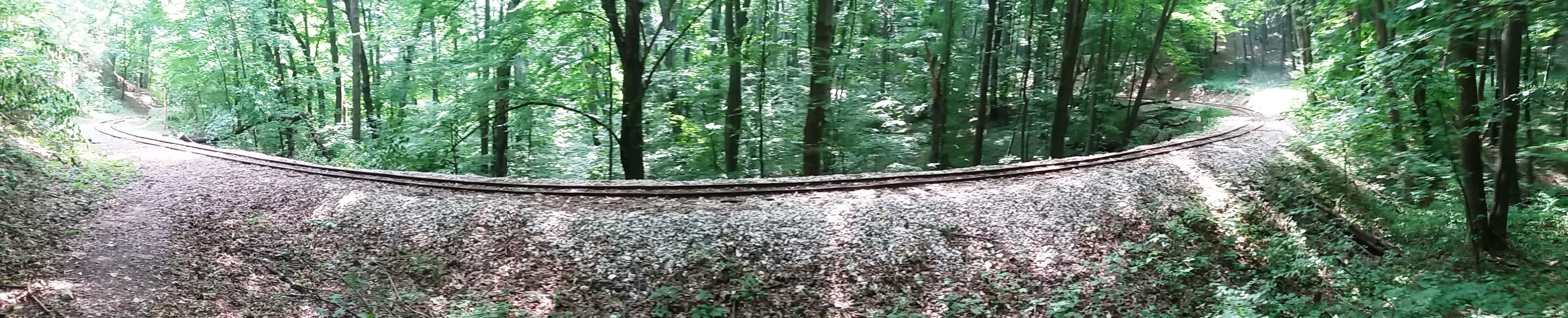 2015. Körpanoráma. Közel 180°-os ív.